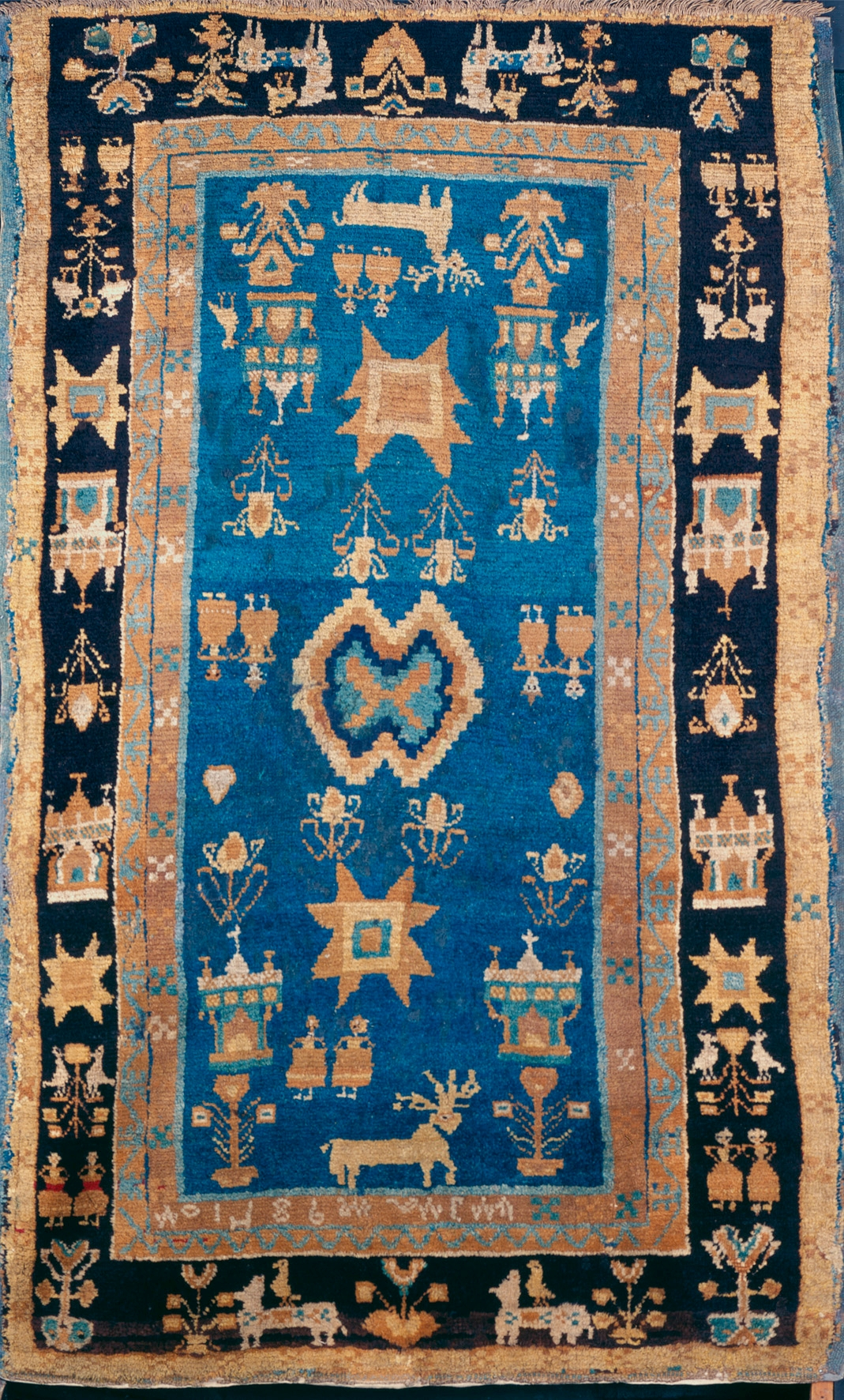 Knüpfteppich, 1789? Gebrauchsort: Lyck, Ostpreußen (Masuren) Wolle, geknüpft (Flachs für Kette und Schuss); Länge x Breite: 228 x 144 cm Ident.Nr. D (17 K 19) 4/1951 GLAM-on-Tour: Wiki goes MEK! 2.0 Wikipedianer fotografierten vom 16. bis 18. November 2018 im Museum Europäischer Kulturen. This photo was taken during a project supported by WMDE. Gefördert von / Supported by: Wikimedia Deutschland, Museum Europäischer Kulturen